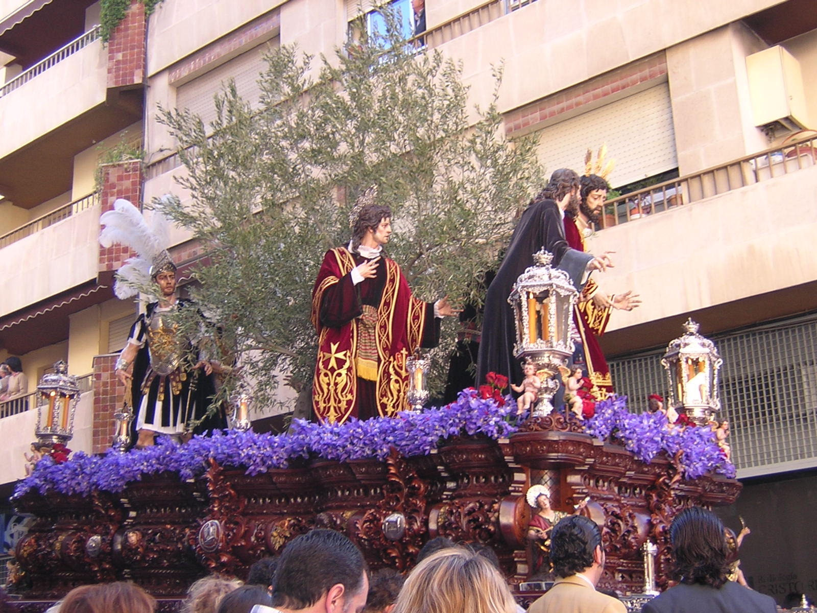 Misterio del Cristo del Amor en su prendimiento. Fue tallado por el escultor José Antonio Navarro Arteaga.